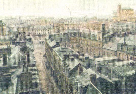 photogravure de la fin du XIXème siècle du centre de la ville du Mans